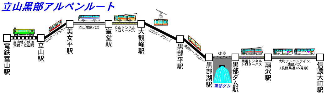 立山黒部アルペンルートの路線（構成）図。